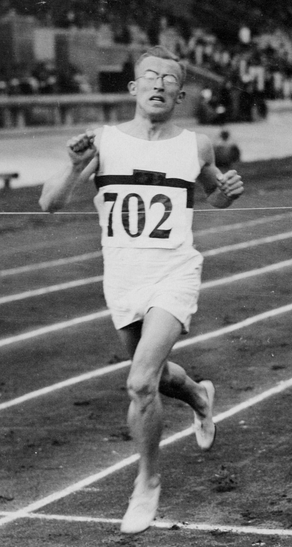 Sport. Olympische Spelen 1928 Amsterdam, Nederland : De Duitser Joachim Büchner wint brons op de 400 m hardlopen.